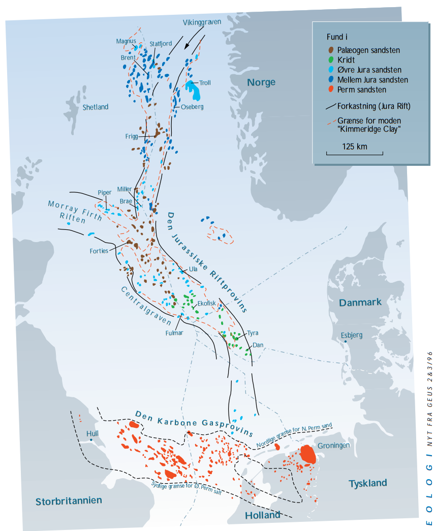 Olie- og gasfund i Nordsøen, efter reservoir-type